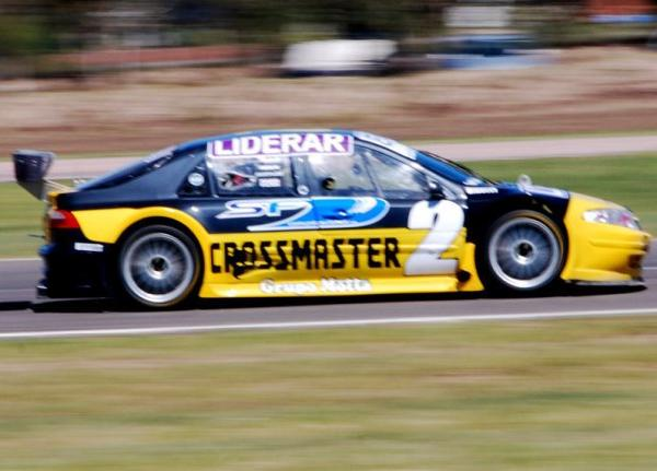 Renault Laguna de TRV6. Piloto: Omar Martínez